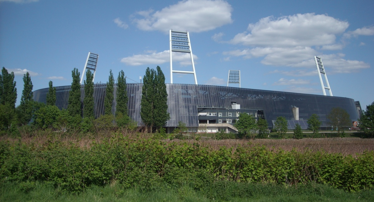 Das Weserstadion in Bremen, Spielstätte des SV Werder Bremen, von Südwesten her gesehen.